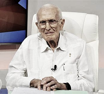 Diputado Asamblea Nacional de Cuba 2018